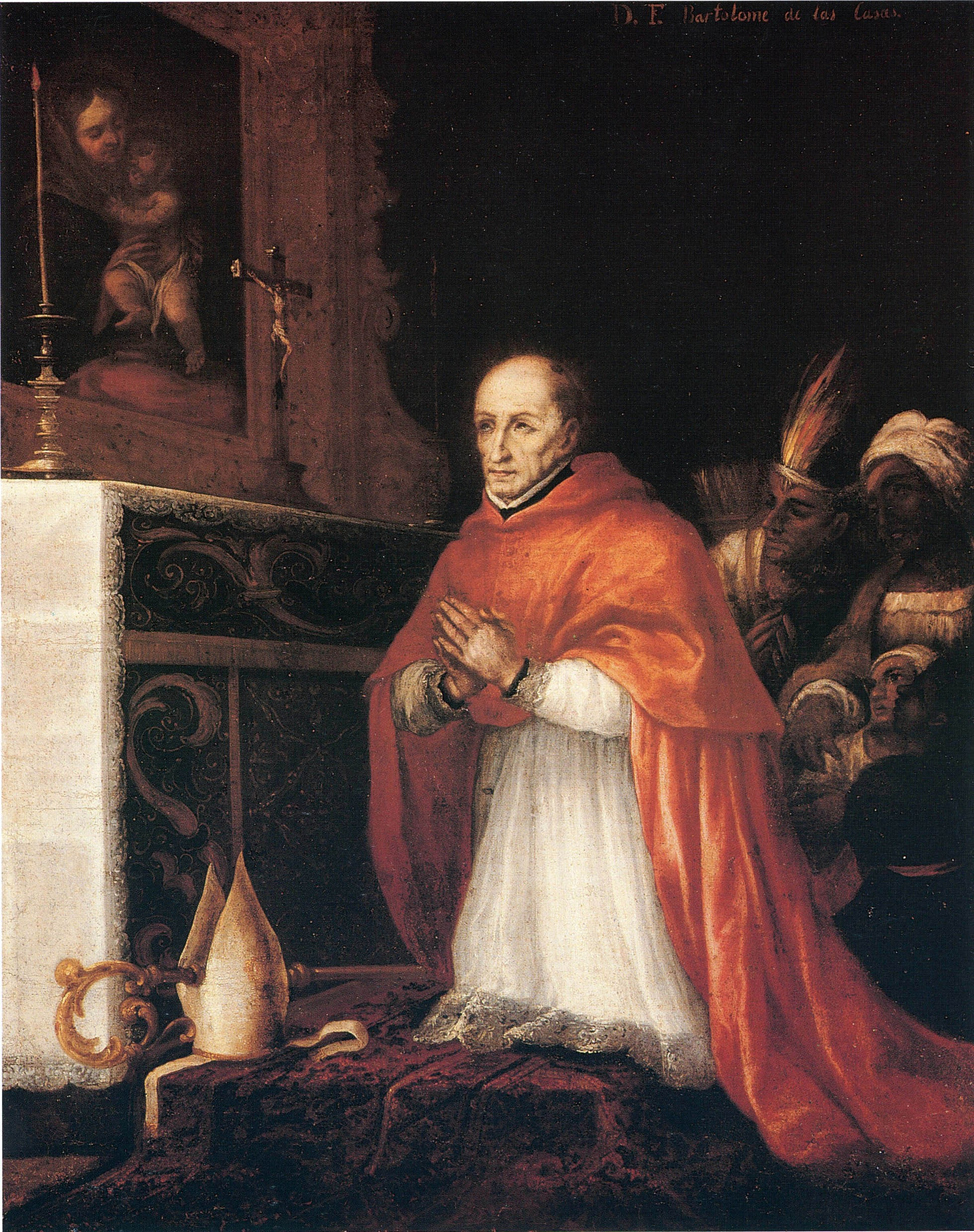 "Santo Toribio Alfonso de Mogrovejo, Arzobispo de Lima (Tít. Ant.: Fray Bartolomé de las Casas Obispo de Chiapa)"